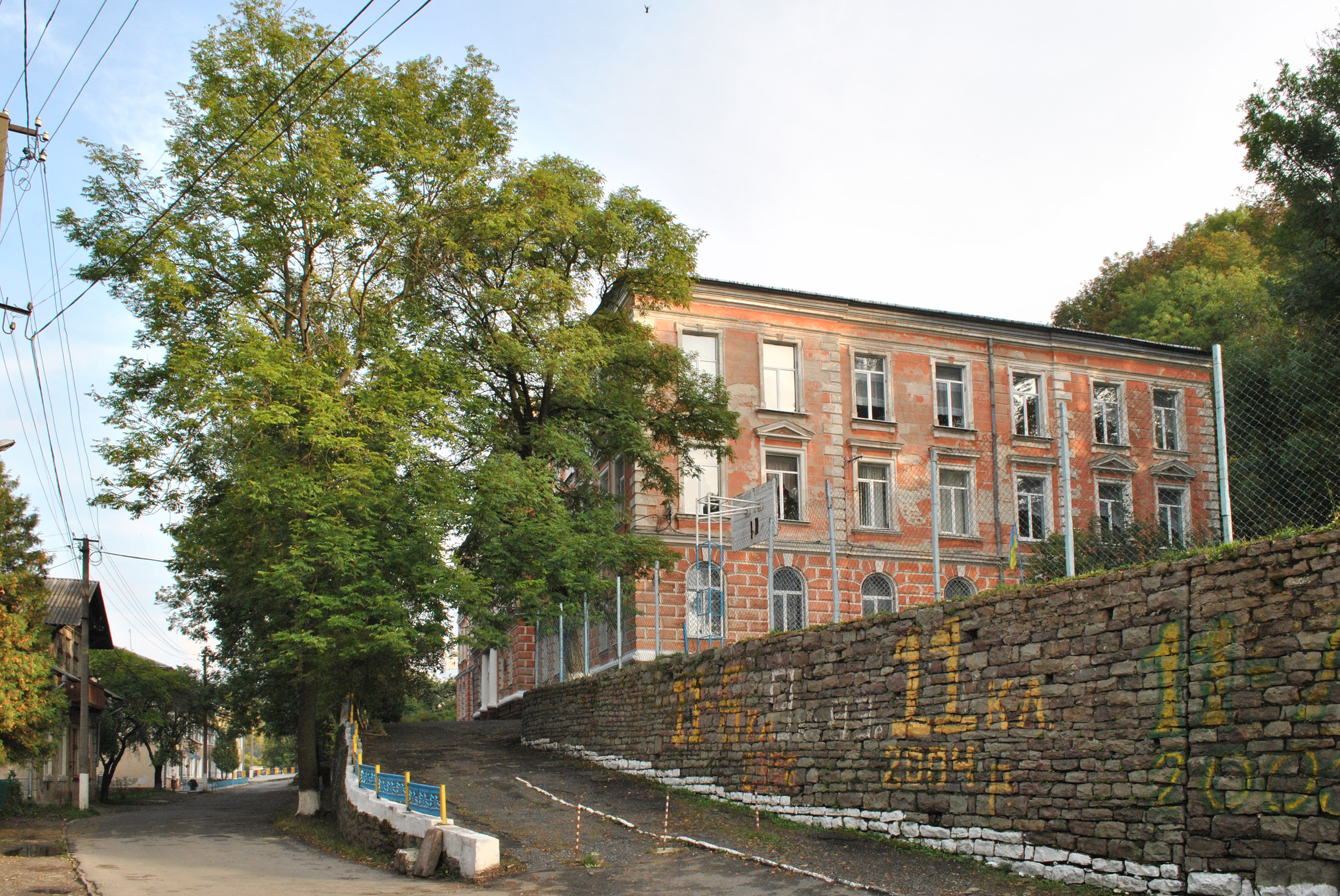 Пам'ятка архітектури місцевого значення в Бучачі на вул. Шкільній, 4: будинок колишньої гімназії, в якій навчався український етнограф, фольклорист, мовознавець, літературознавець, мистецтвознавець, перекладач та громадський діяч Володимир Гнатюк.